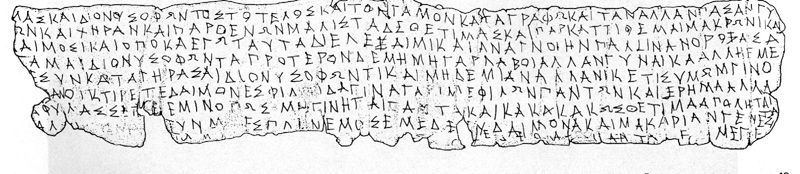 Pella Katadesmos, presumably public domain